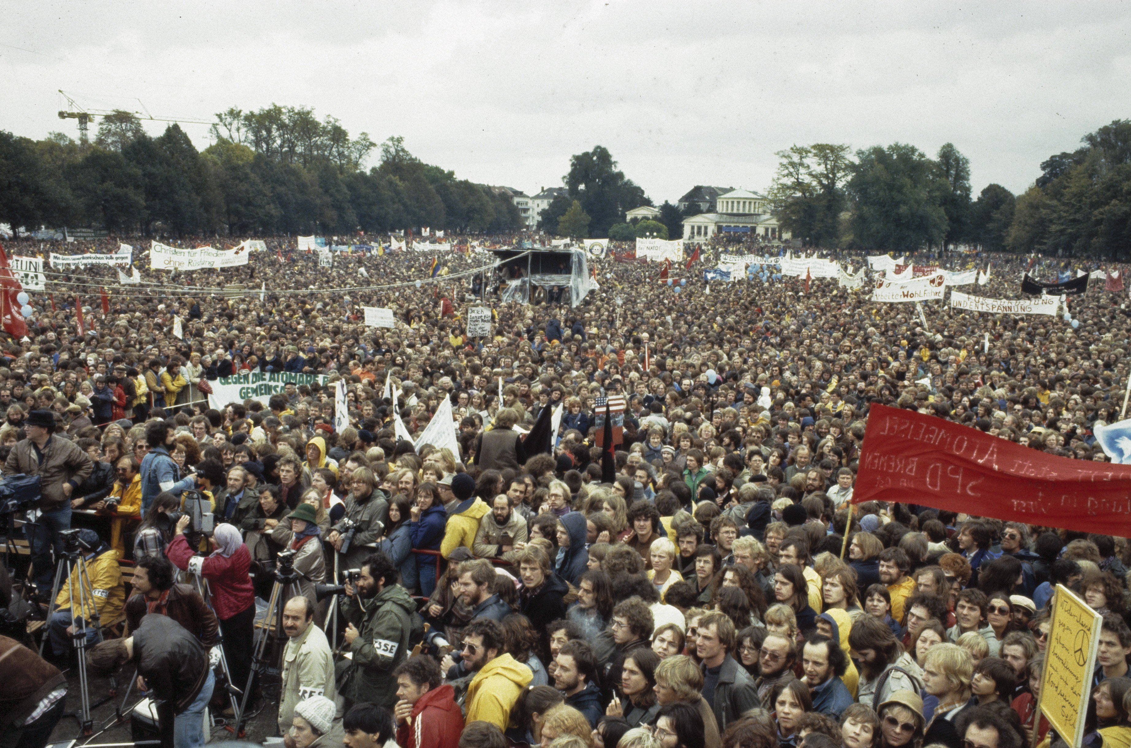 Collectie / Archief : Fotocollectie Anefo Reportage / Serie : [ onbekend ] Beschrijving : Massale vredesdemonstratie in Bonn tegen de modernisering van kernwapens in West Europa Datum : 10 oktober 1981 Locatie : Bonn Trefwoorden : KERNWAPENS, demonstraties Fotograaf : Bogaerts, Rob / Anefo Auteursrechthebbende : Nationaal Archief Materiaalsoort : Dia (kleur) Nummer archiefinventaris : bekijk toegang 2.24.01.06 Bestanddeelnummer : 253-8611